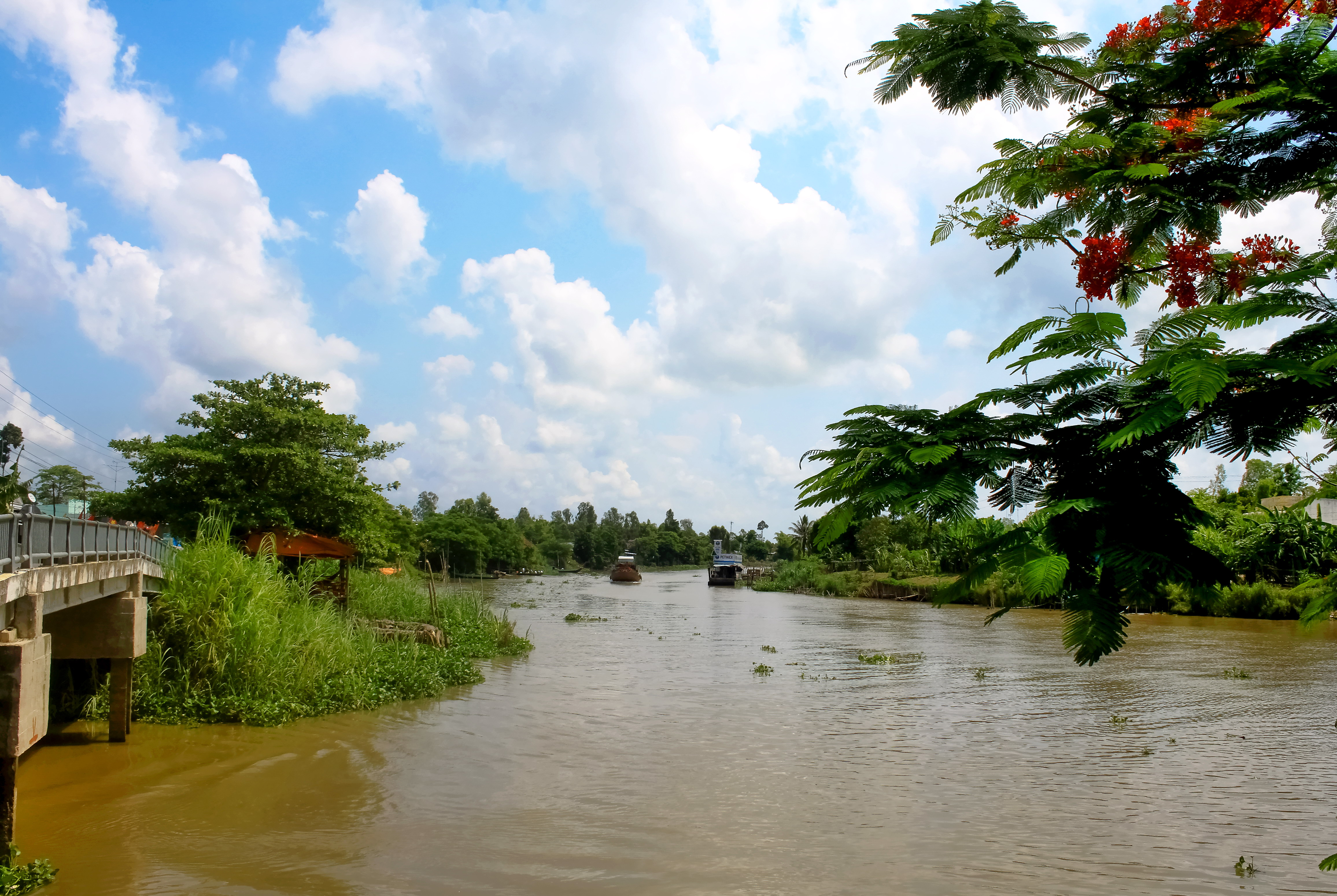 Kênh Thoại Hà, đoạn chảy qua đình Định Mỹ, thuộc xã Định Mỹ, huyện Thoại Sơn, tỉnh An Giang, Việt Nam.